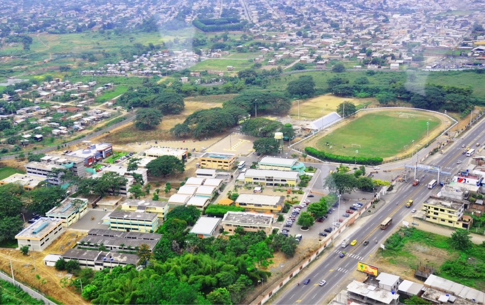 Vista panorámica de la Universidad Estatal de Milagro